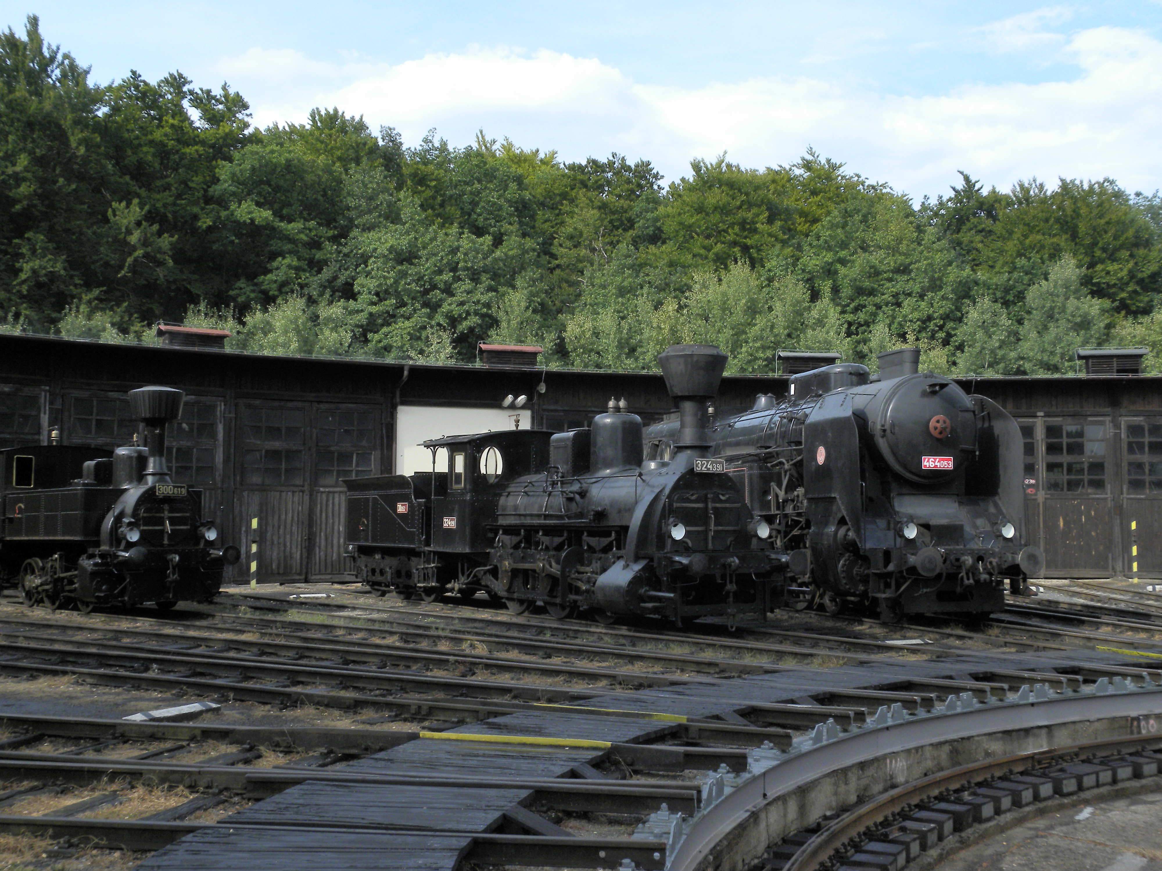 Muzeum ČD Lužná u Rakovníka